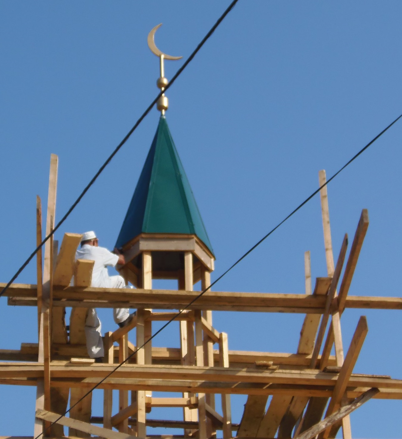 Мәсеттең манараһы ҡуйылды. Йөйәк. Белорет районы.